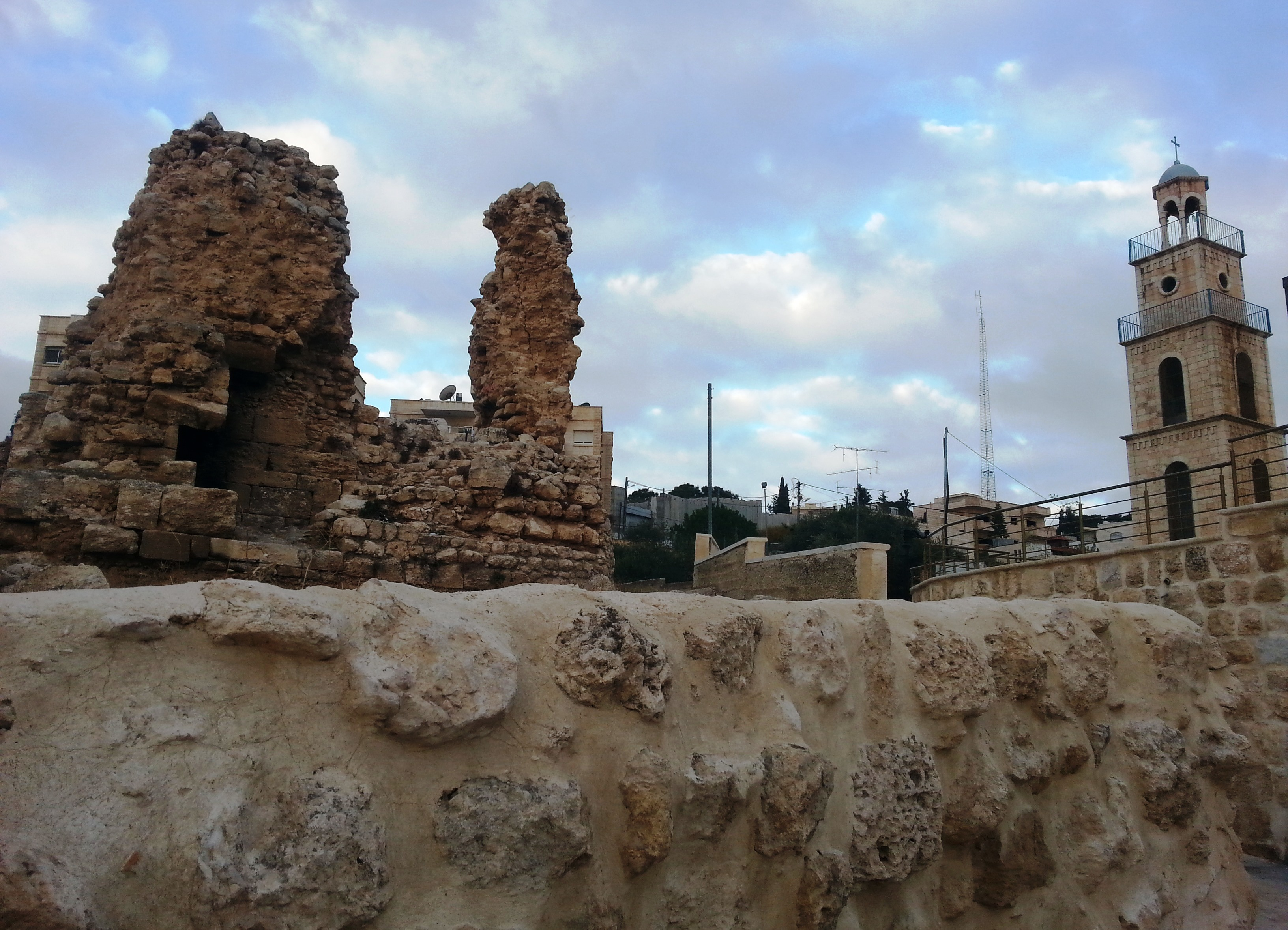 القناطر في بلدة العيزرية بالقدس تصوير نهيل أبو غيث